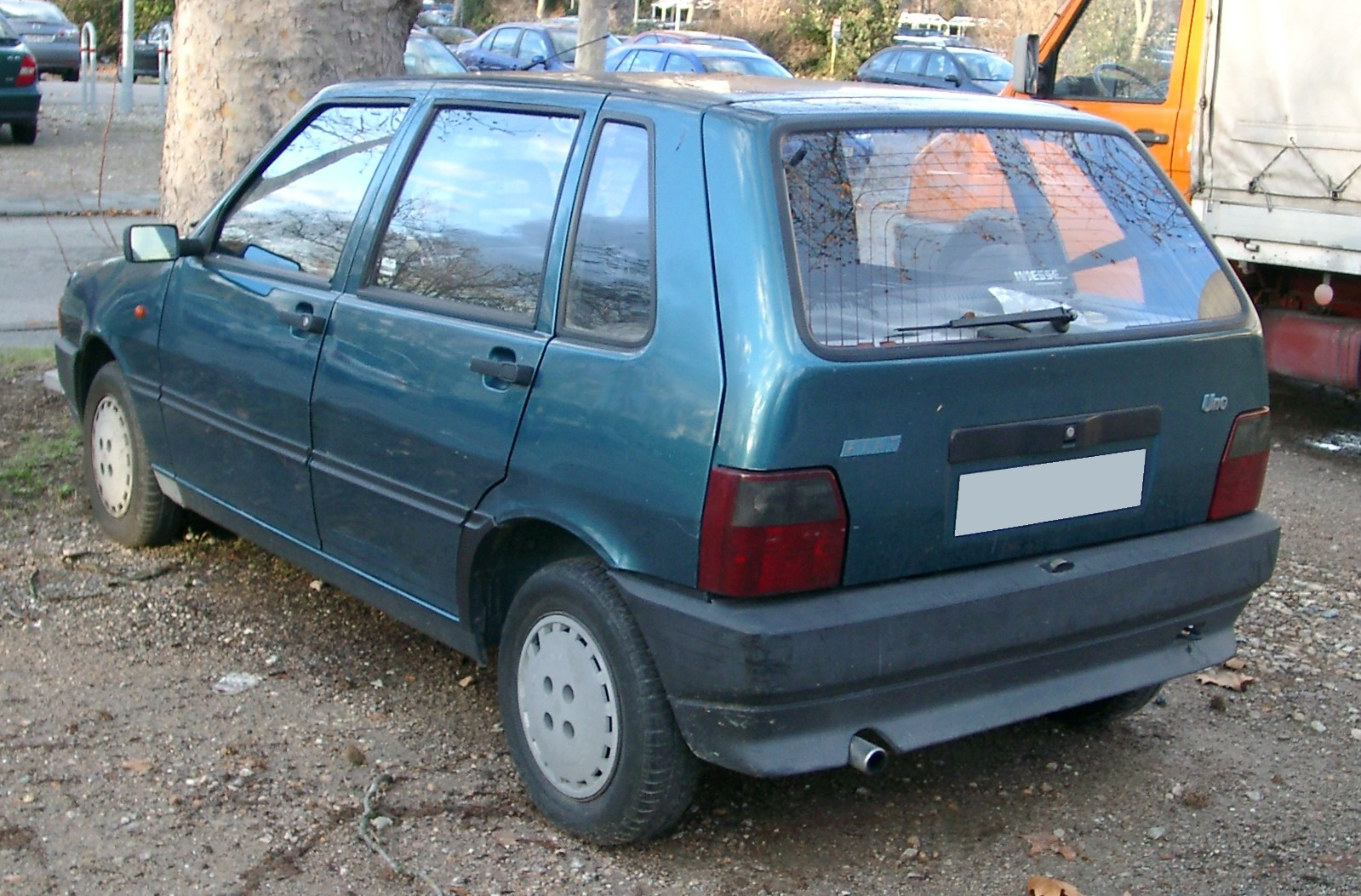 Fiat Uno